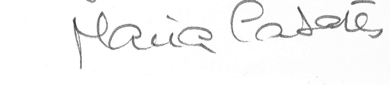 Signature autographe de Maria Casares, actrice de cinéma et de théâtre